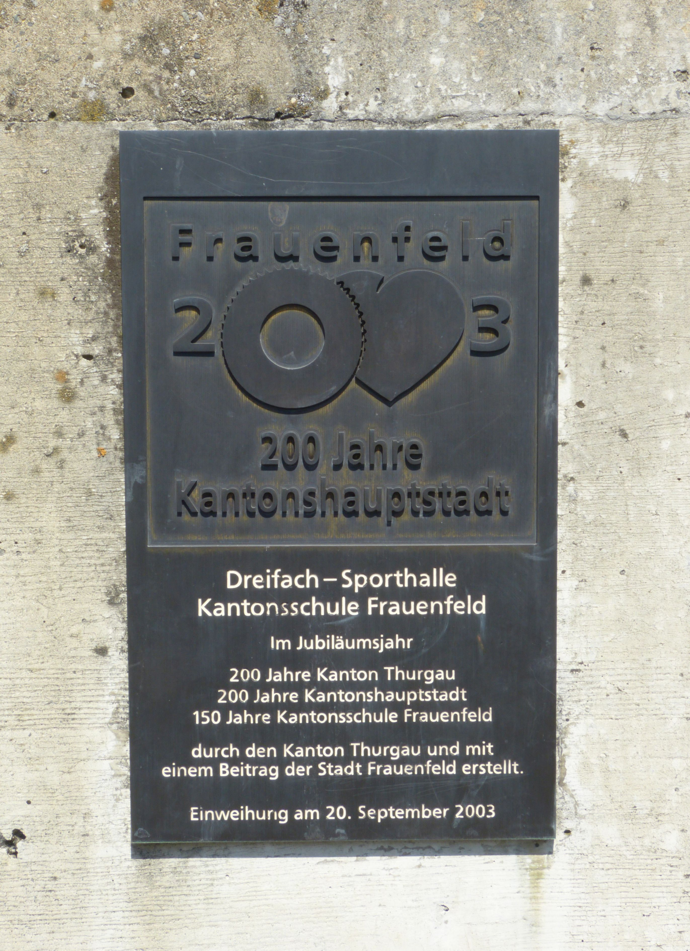 Kantonsschule